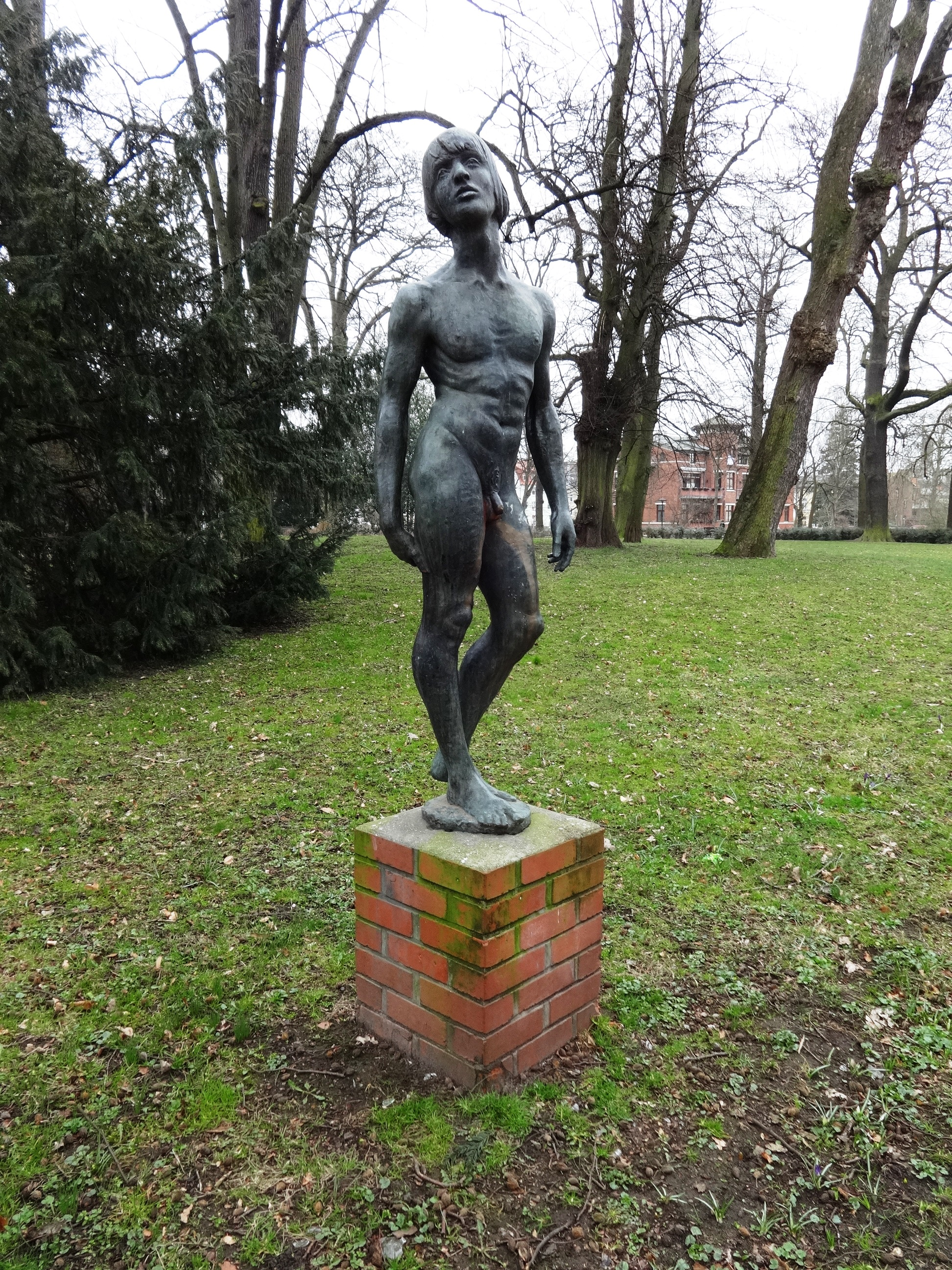 Der Lindengarten ist eine Parkanlage im Osten von Wismar. Zur Schwedenzeit befand sich auf dem Gelände eine Befestigungsanlage.